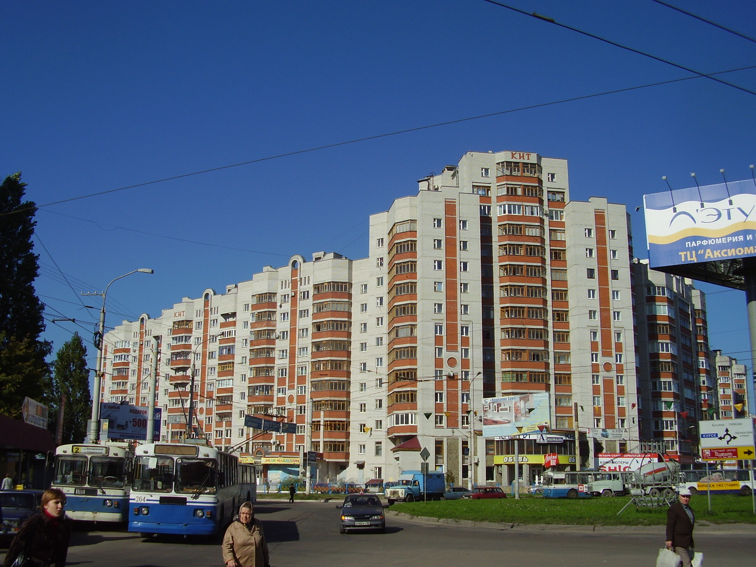 Воронеж,транспортное кольцо у Молодёжного в Северном